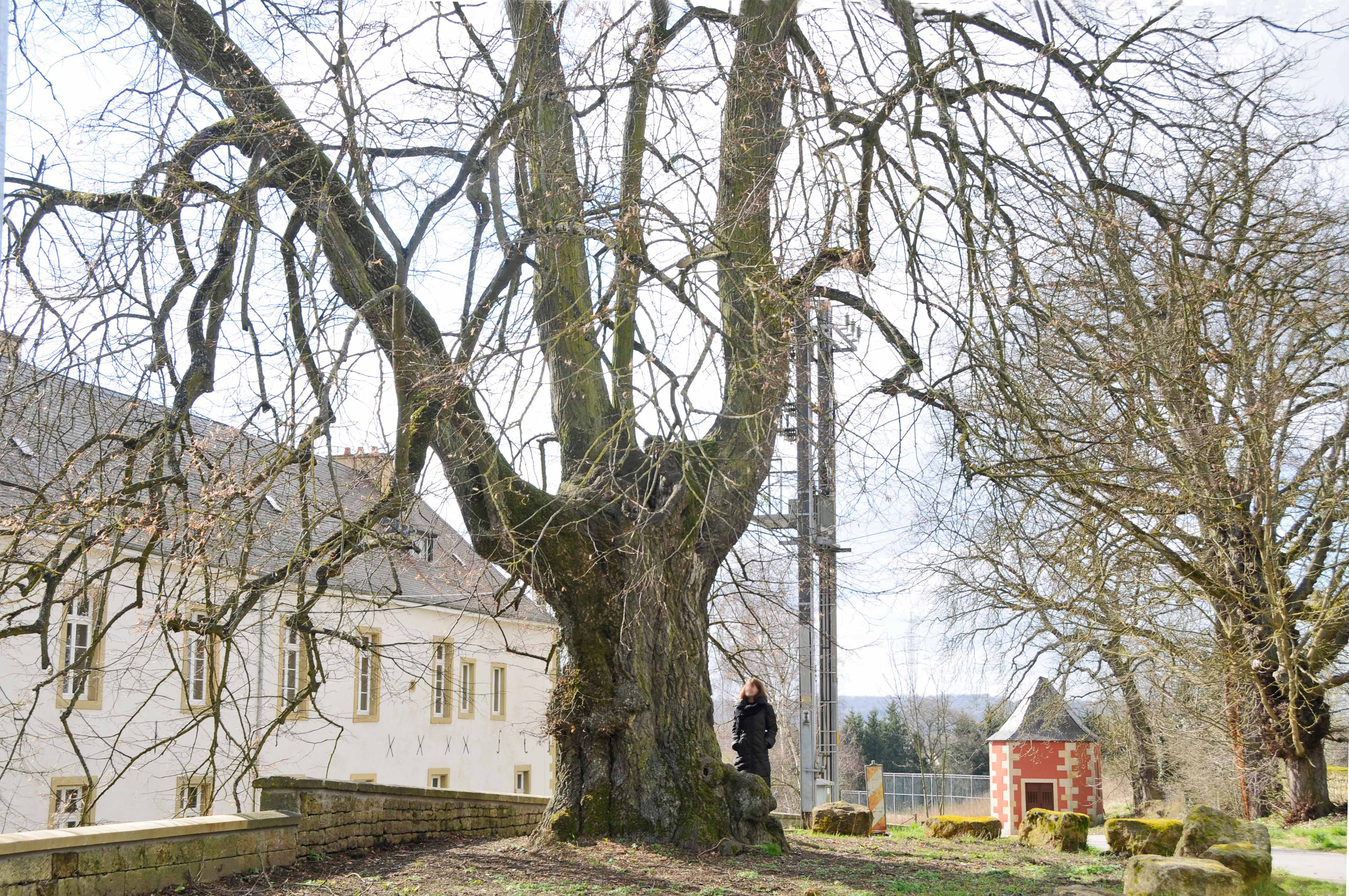 Lann beim Suessemer Schlass. Suessem + Kategorie:Gemeng Suessem